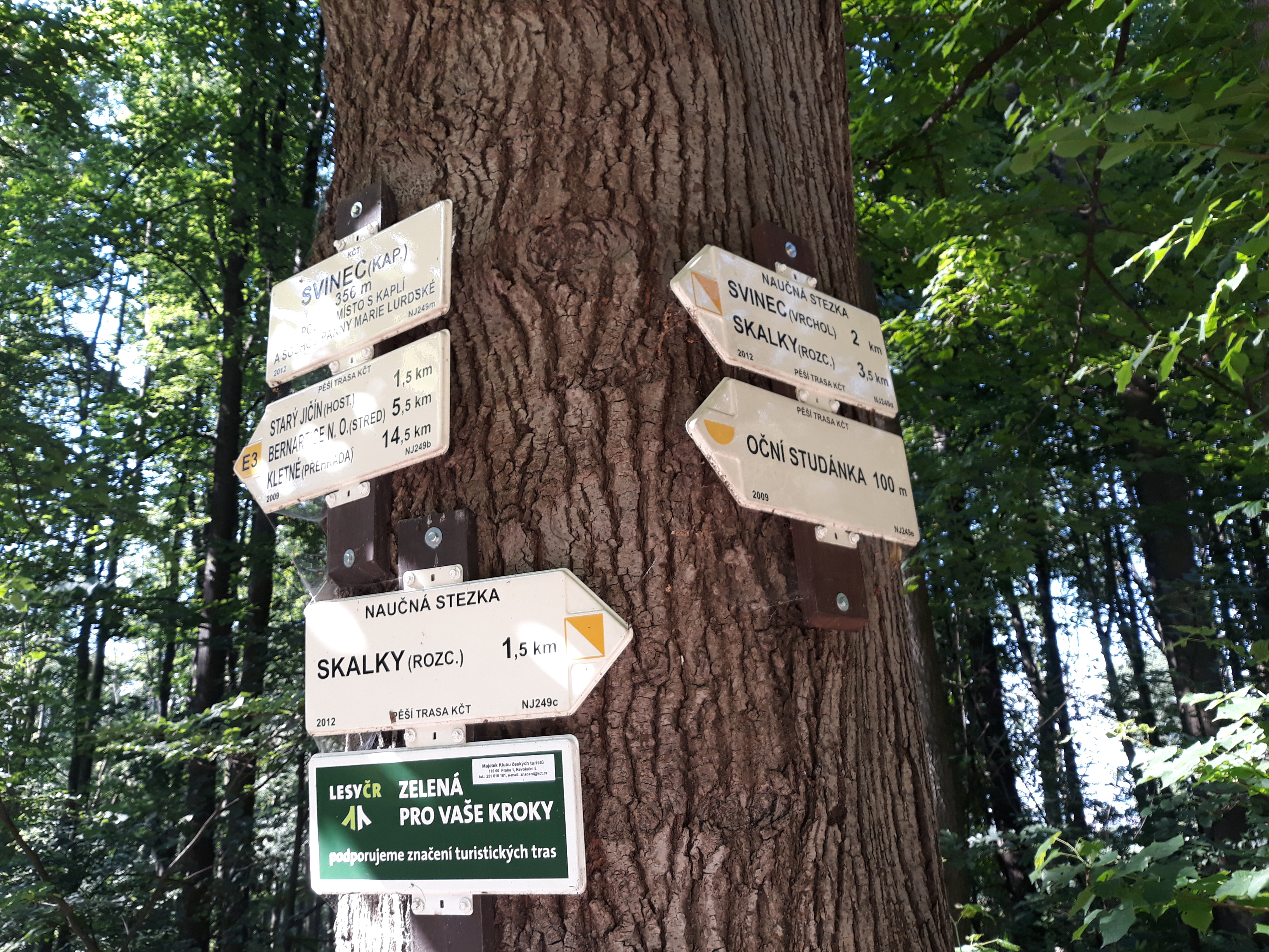 Poutní místo s kaplí a sochou Panny Marie Lurdské (356 m.n.m.)